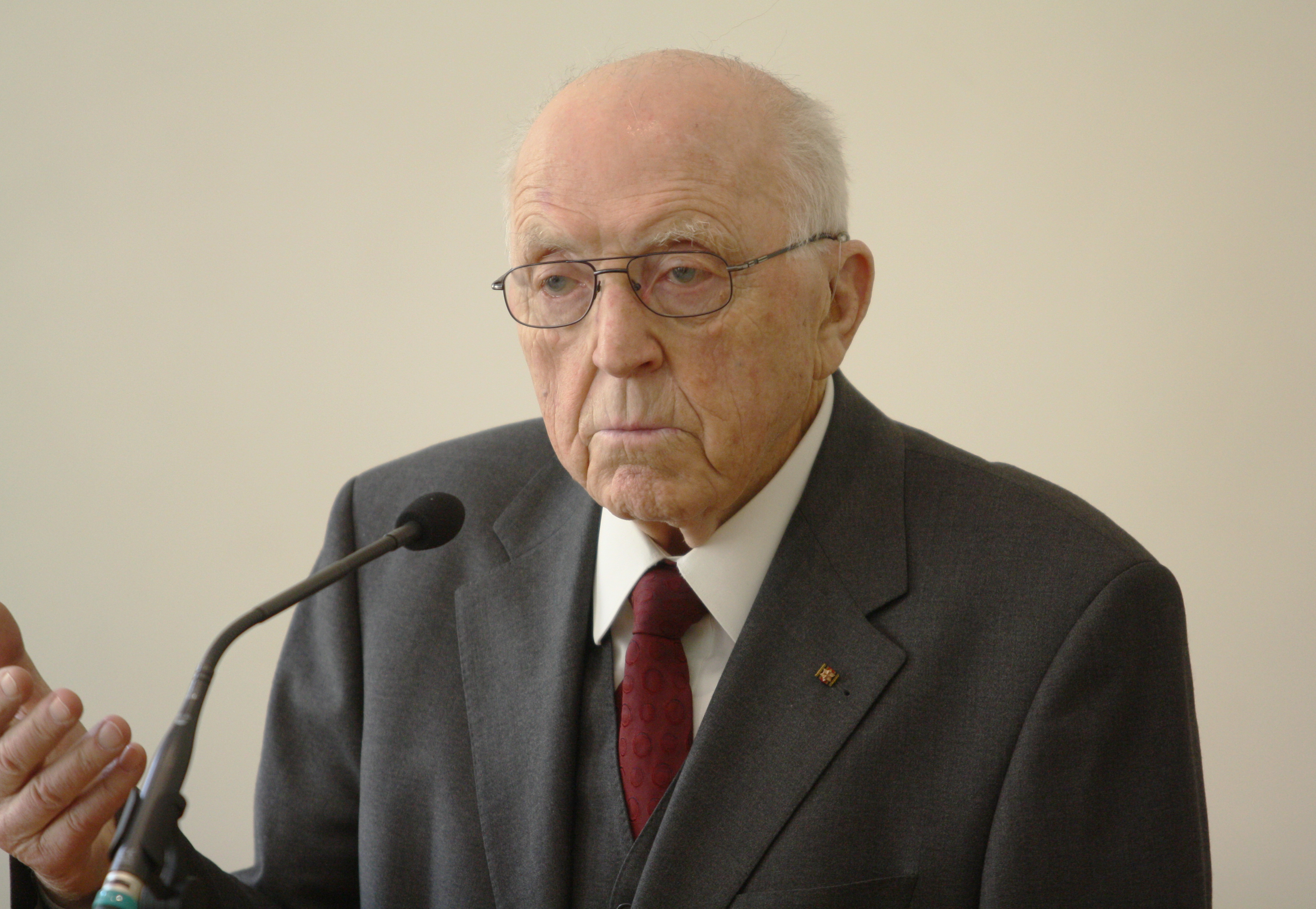 Bruno Merk, ehemaliger bayerischer CSU-Politiker und Bayerischer Innenminister. Anlass: Empfang zum 90. Geburtstag. Hier während seiner Dankesworte am 17.04.2012 im Bayerischen Innenministerium.